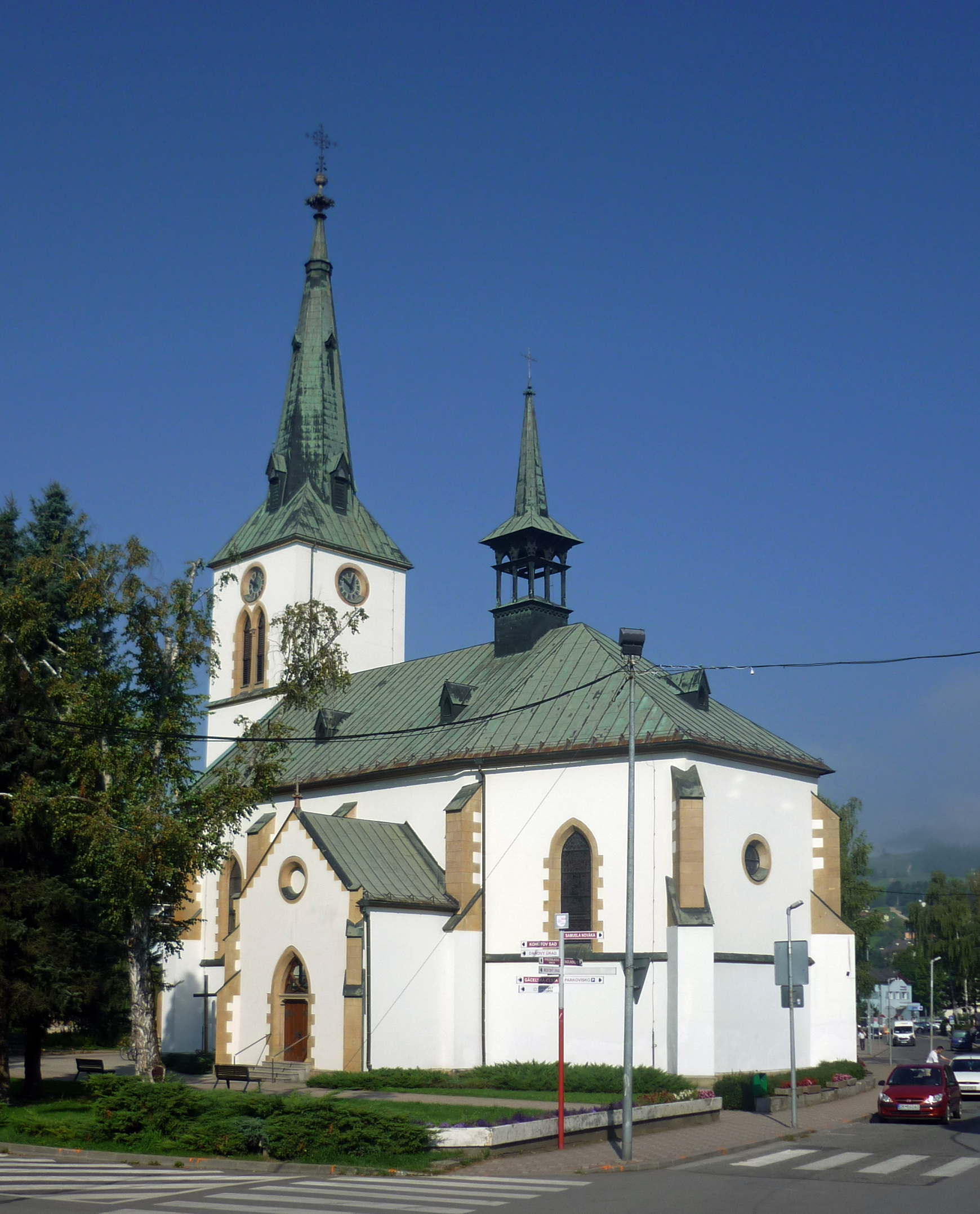 Katharinenkirche in Dolný Kubín in der Slowakei